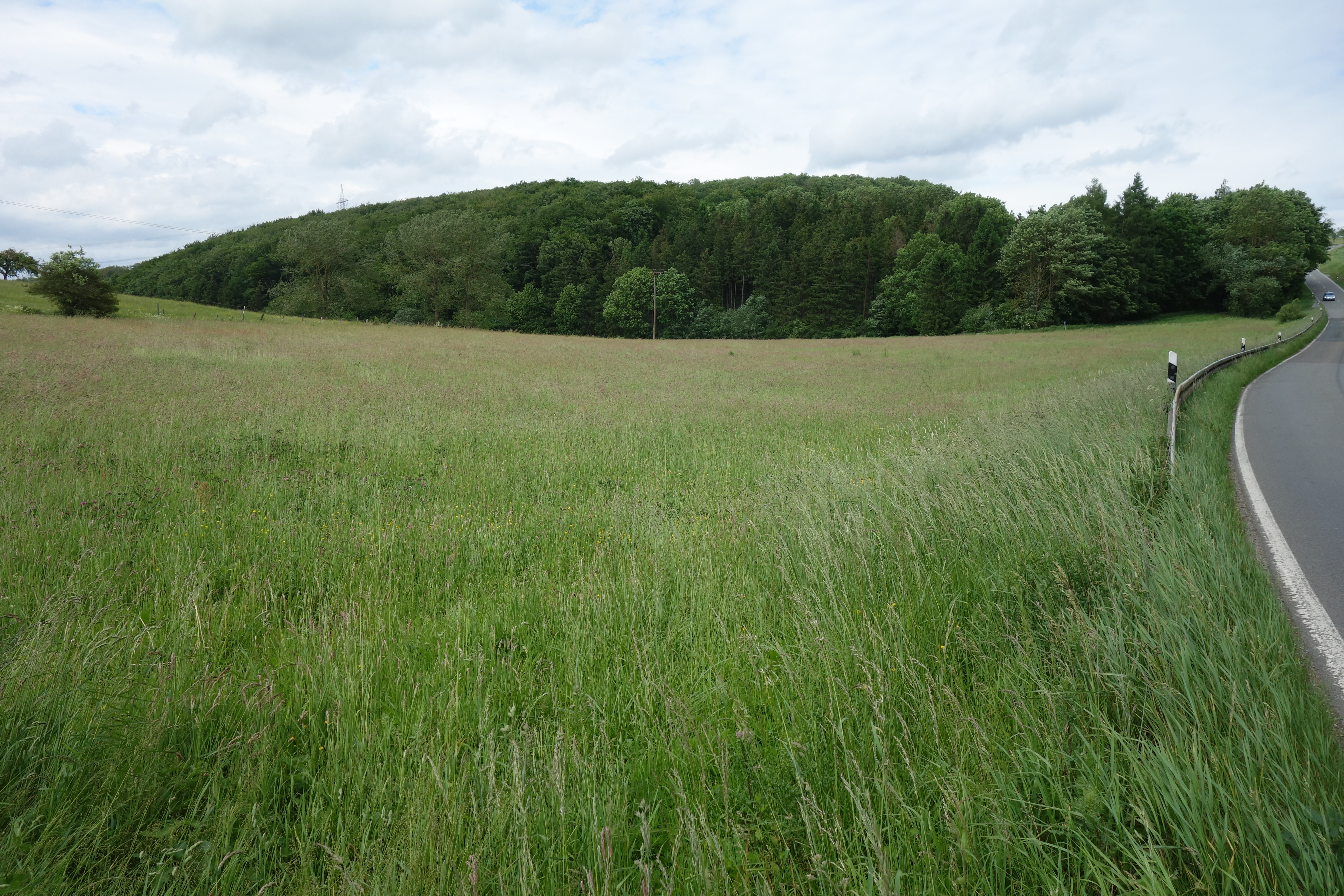 Wald vom Naturschutzgebiet Obere Trift aus Nordwesten von K 60. Wiesen gehören nicht zum NSG, auch rechter Waldbereich mit fichten liegt außerhalb des NSG's.